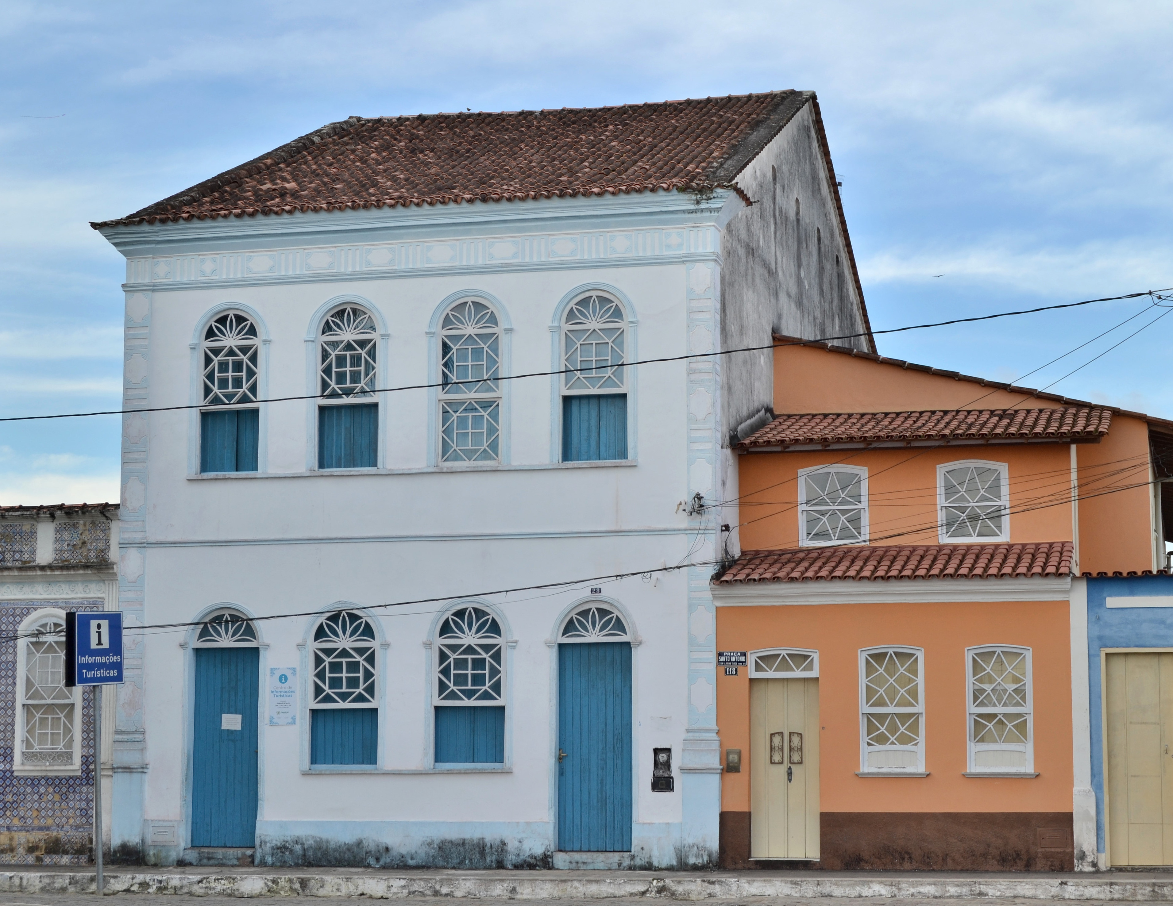 Antigos prédios históricos no centro da cidade de Caravelas-BA onde funciona a Secretaria de Cultura e Turismo bem como o Centro de Informações Turísticas